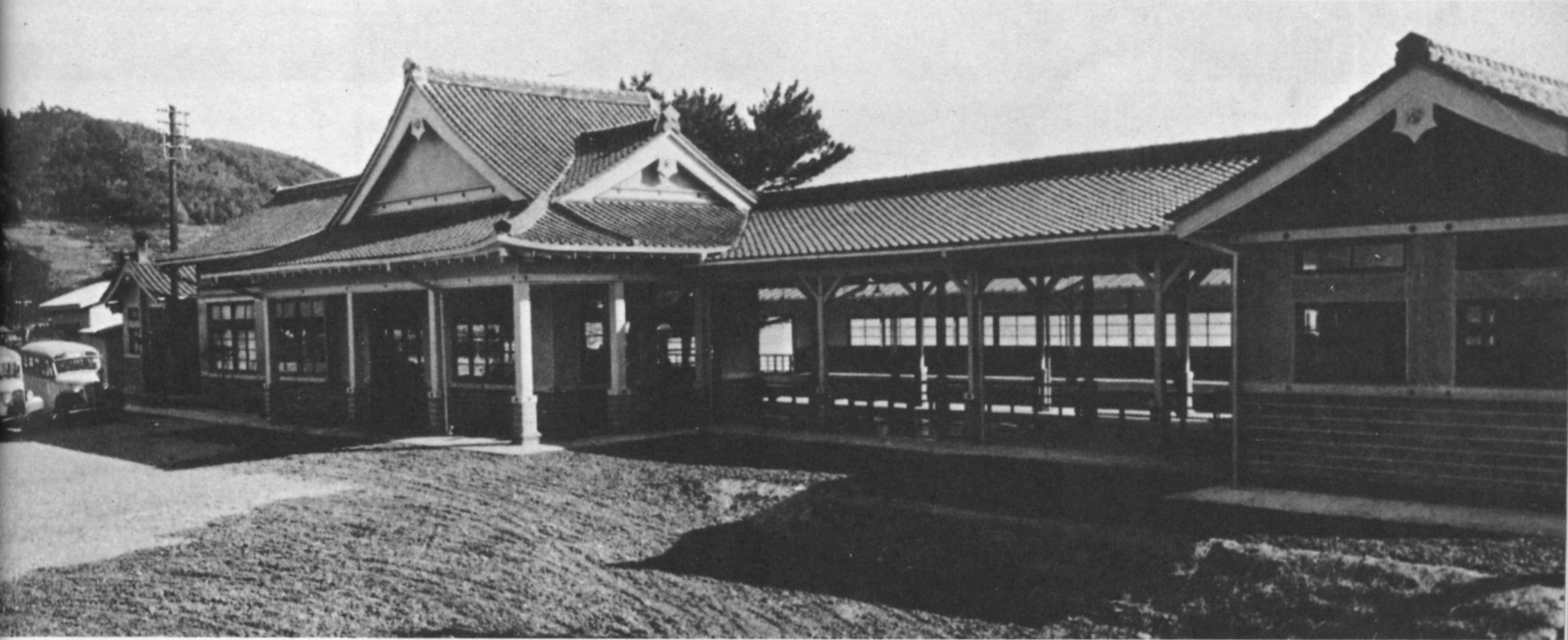 改築から間もない那智駅。和歌山県東牟婁郡。出典書籍では「昭和12年」だけだが、毎日フォトバンクの同一写真では「1937年12月撮影」とある。